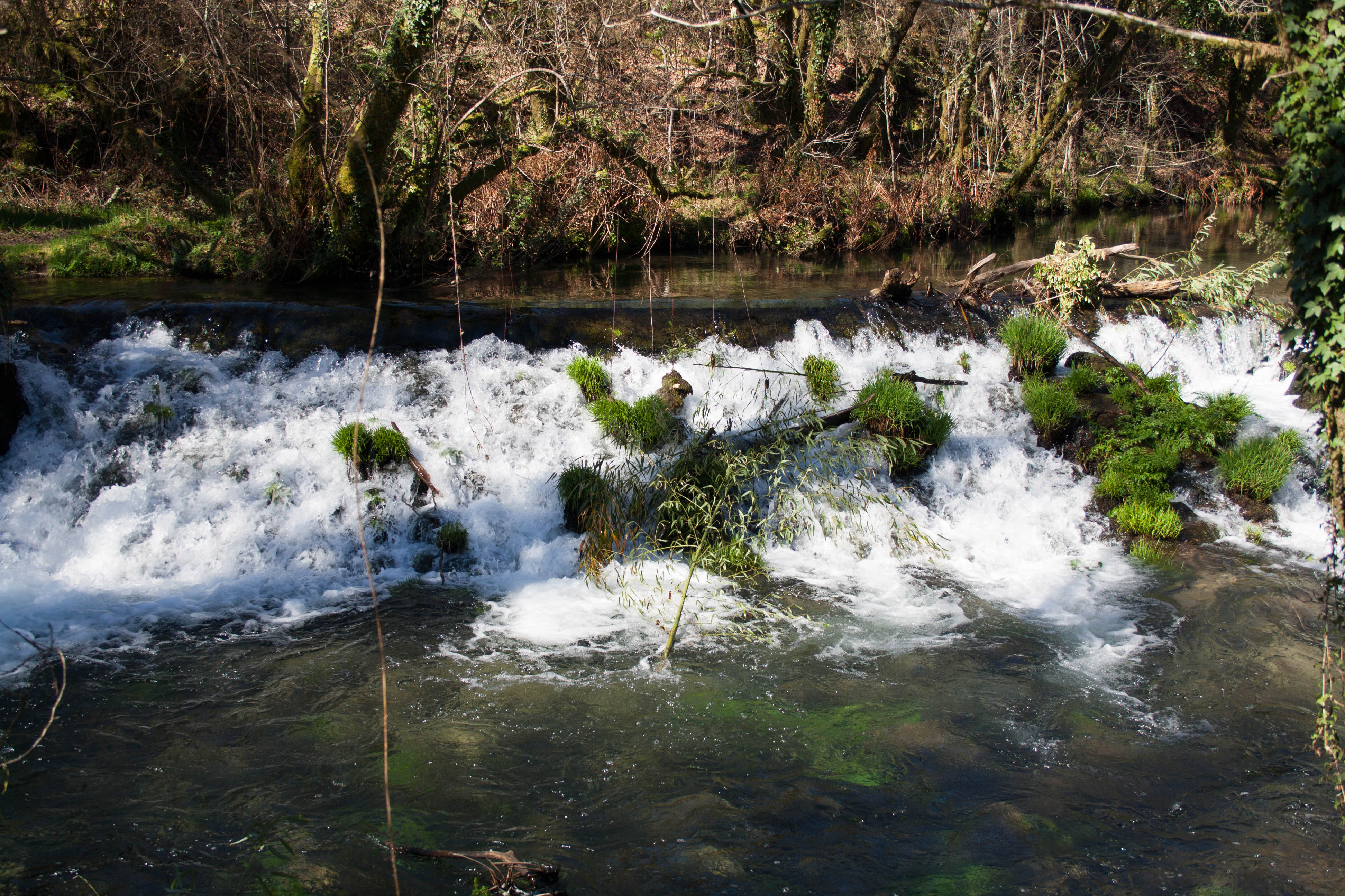 Conjuntos de riachuelos(Mendres, Ansil, Borbén...) que van aumentando su caudal, hasta llegar al río Tea